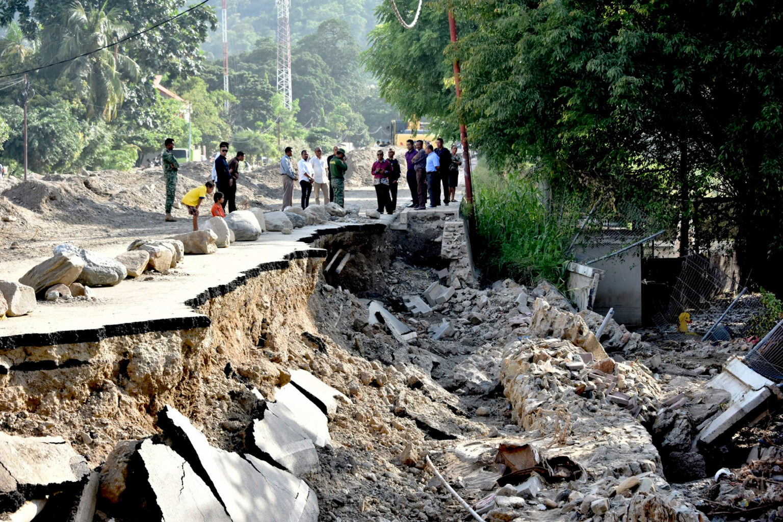 Flut in Dili, 13. März 2020